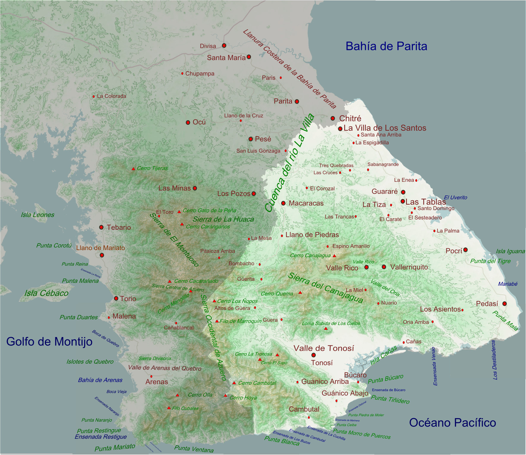 Relieve de la provincia de Los Santos y su ubicación en Azuero